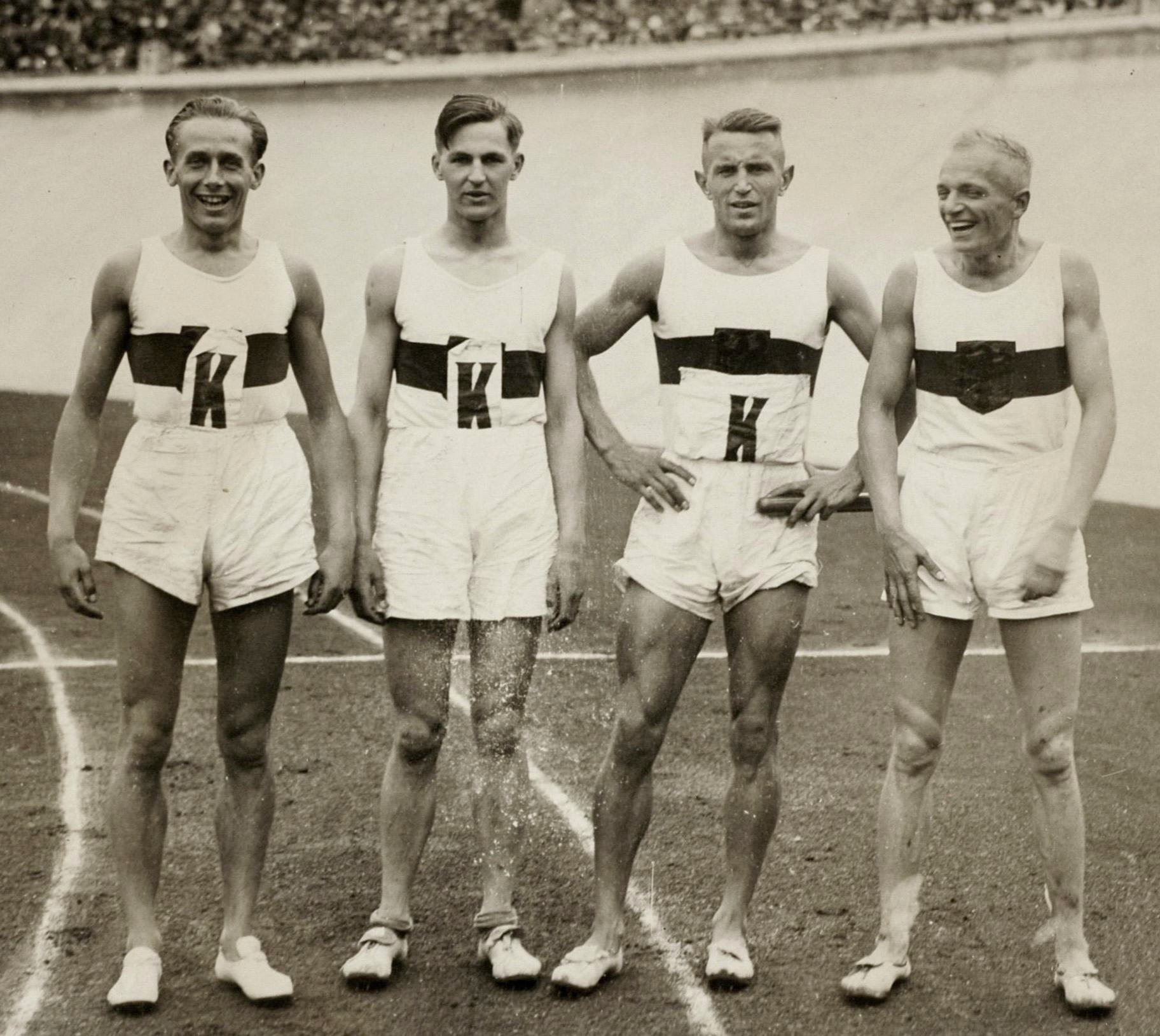 Sport. Olympische Spelen 1928 Amsterdam, Nederland : Het Duitse team voor de 4x400 m estafette, dat tweede werd.